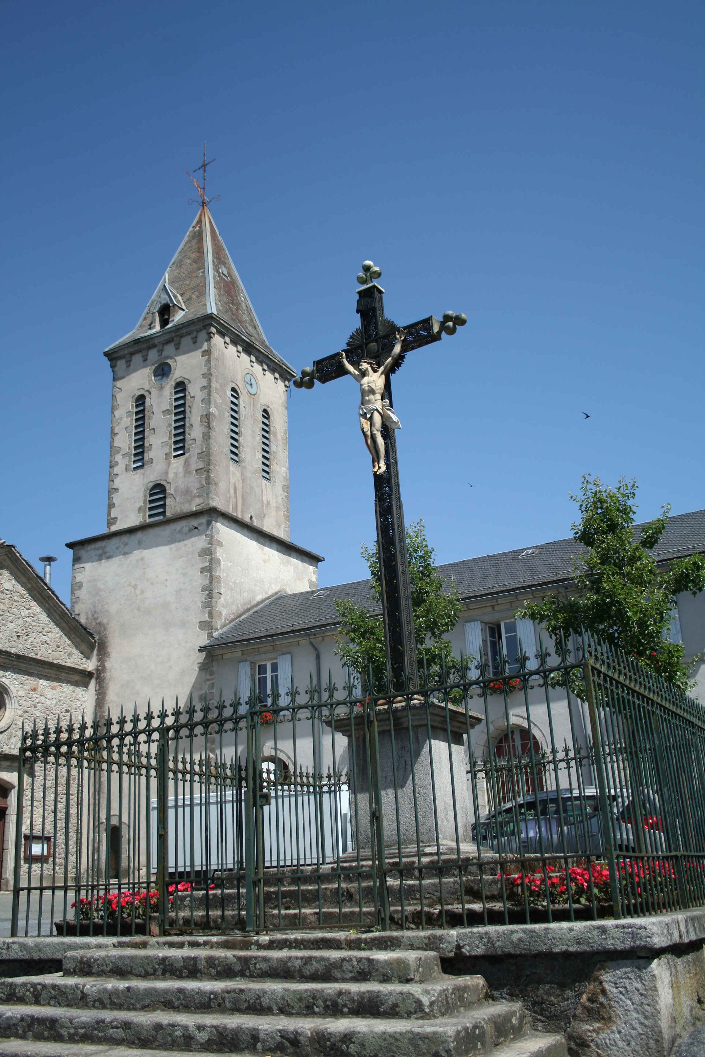 Anglès (Tarn) - église Notre-Dame-de-l'Assomption et croix.